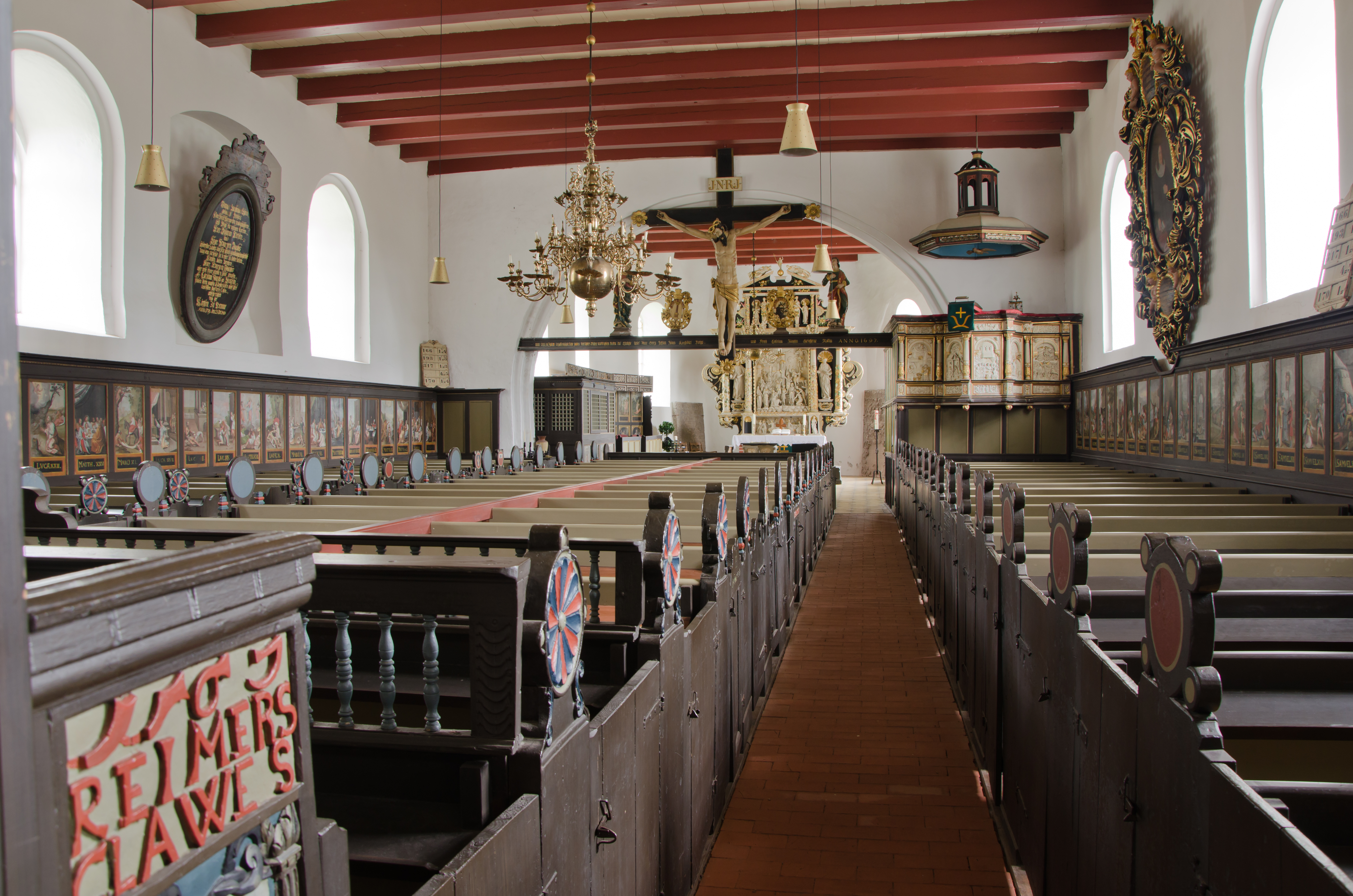 Hemme Kirche Blick in den Innenraum